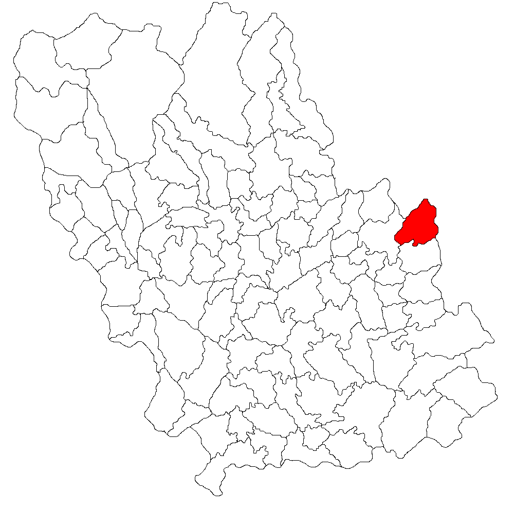 Categorie:Hărţi ale judeţului Prahova